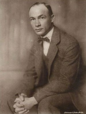 Der deutsche Schauspieler Paul Otto